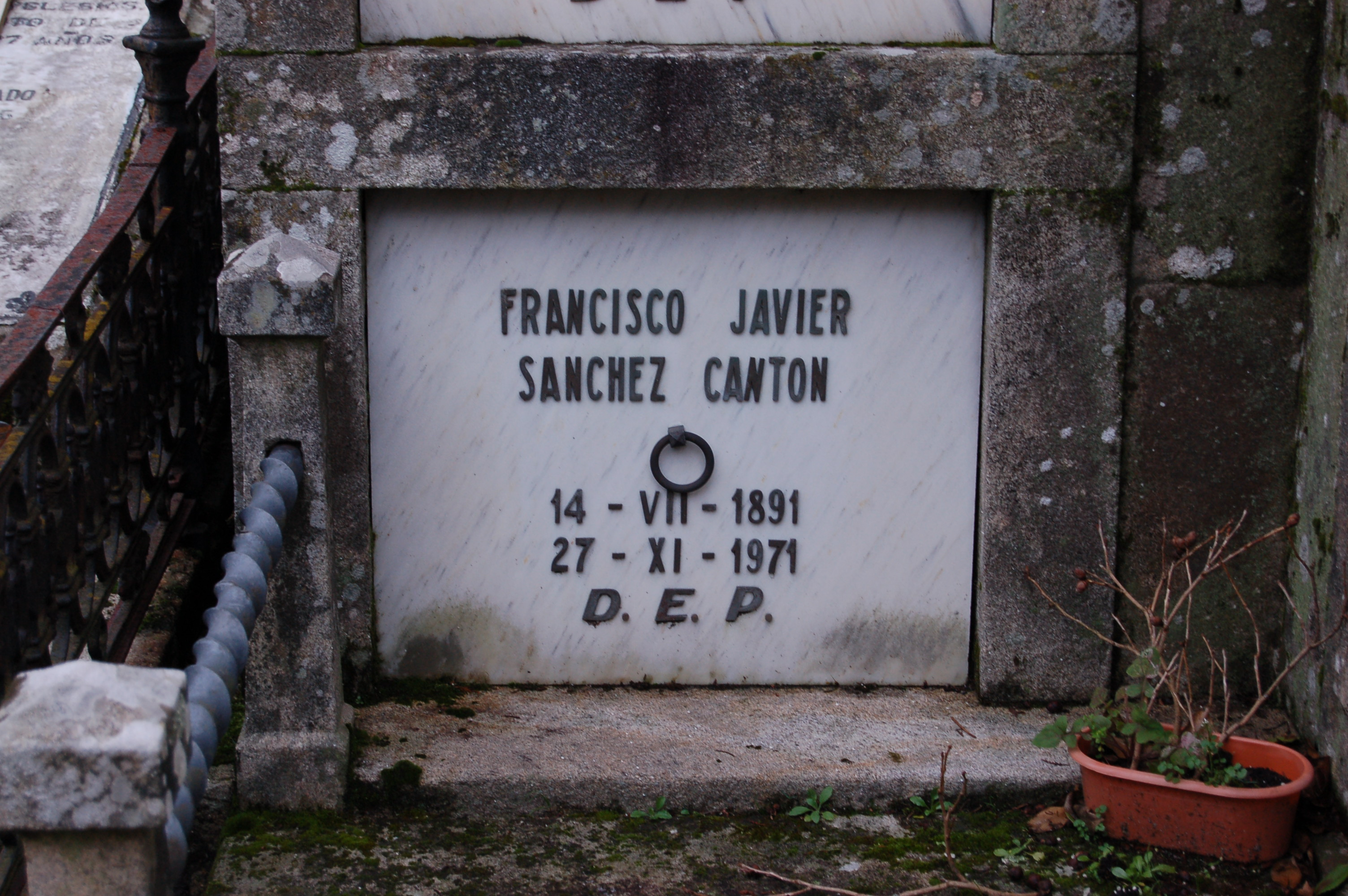 Nicho de Francisco Javier Sánchez Cantón no Cemiterio de San Amaro de Pontevedra